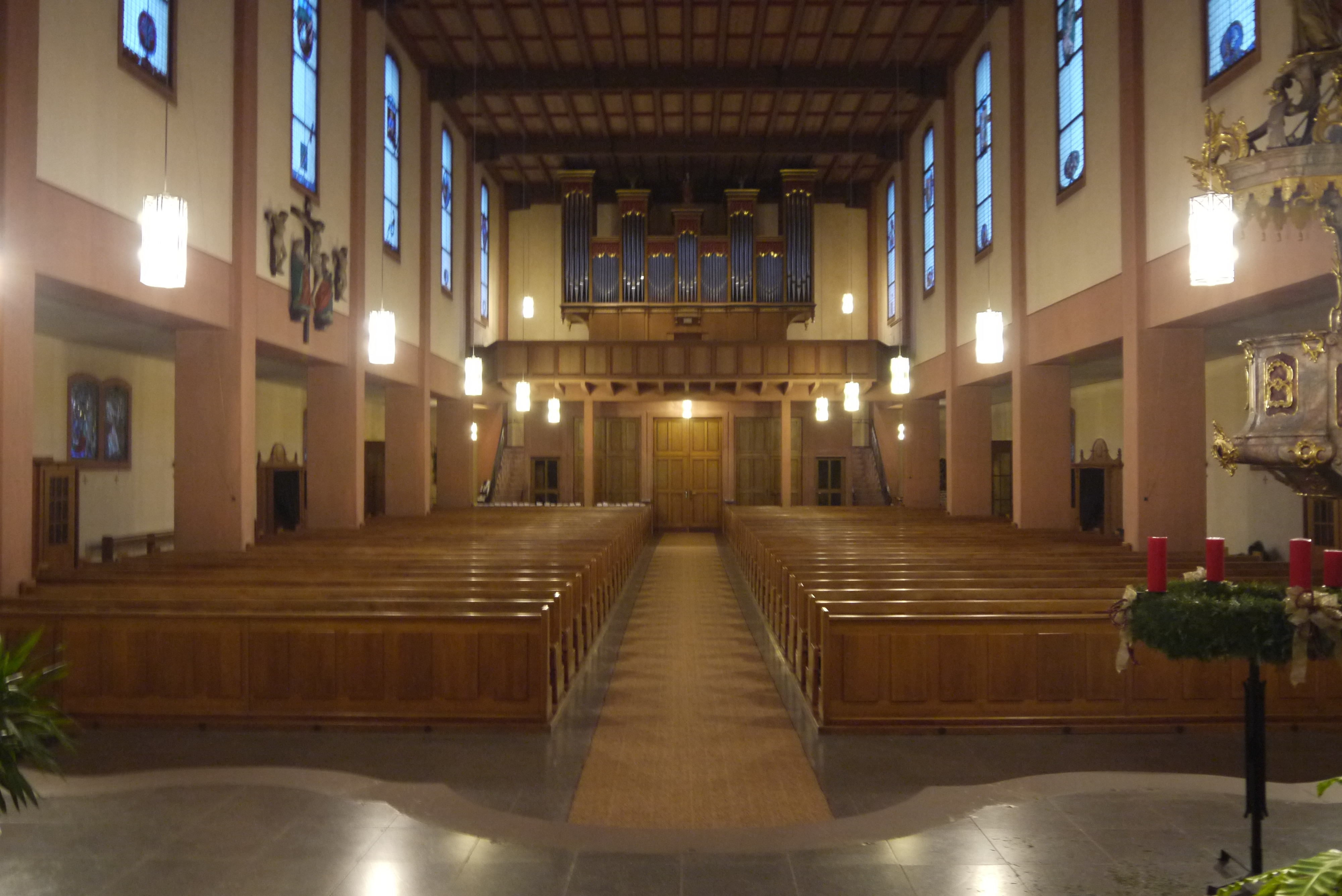 Kirche St. Martin Külsheim